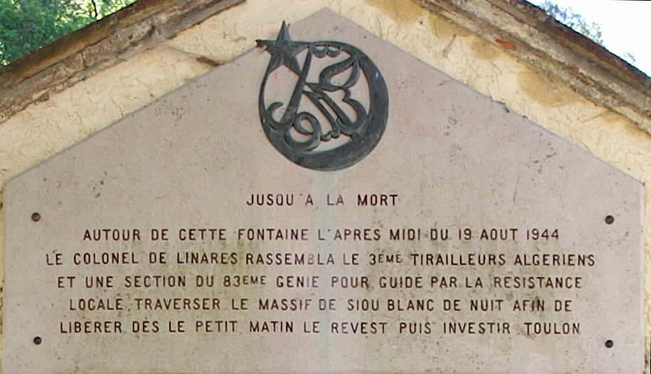 3e Régiment de Tirailleurs Algériens - Plaque commémorative fixée sur la fontaine extérieure faisant face à l'entrée de la Chartreuse de Montrieux, commune de Méounes-lès-Montrieux, dans le Var.